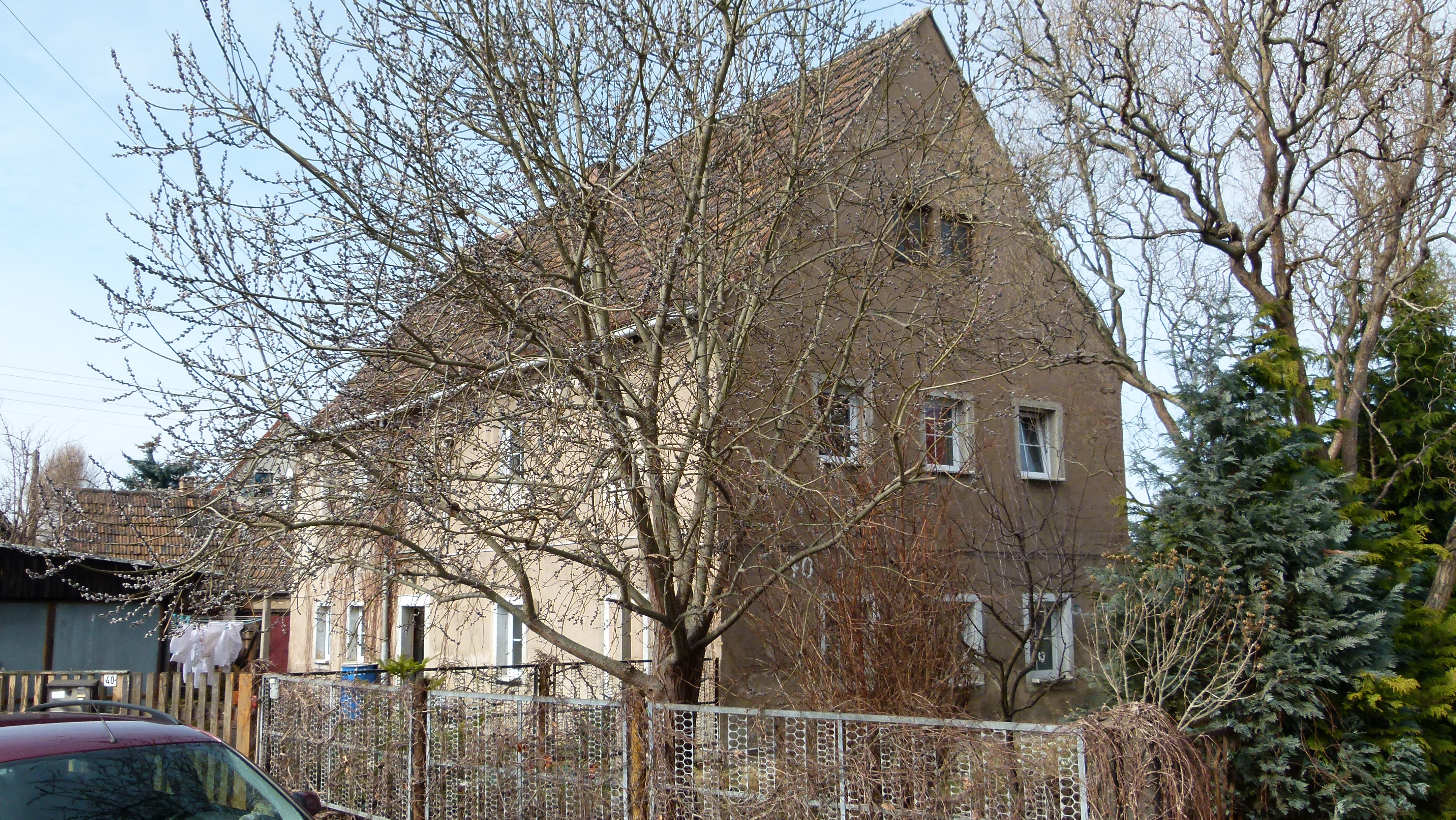 Denkmalgeschütztes Gebäude, Altnaundorf 40, Radebeul